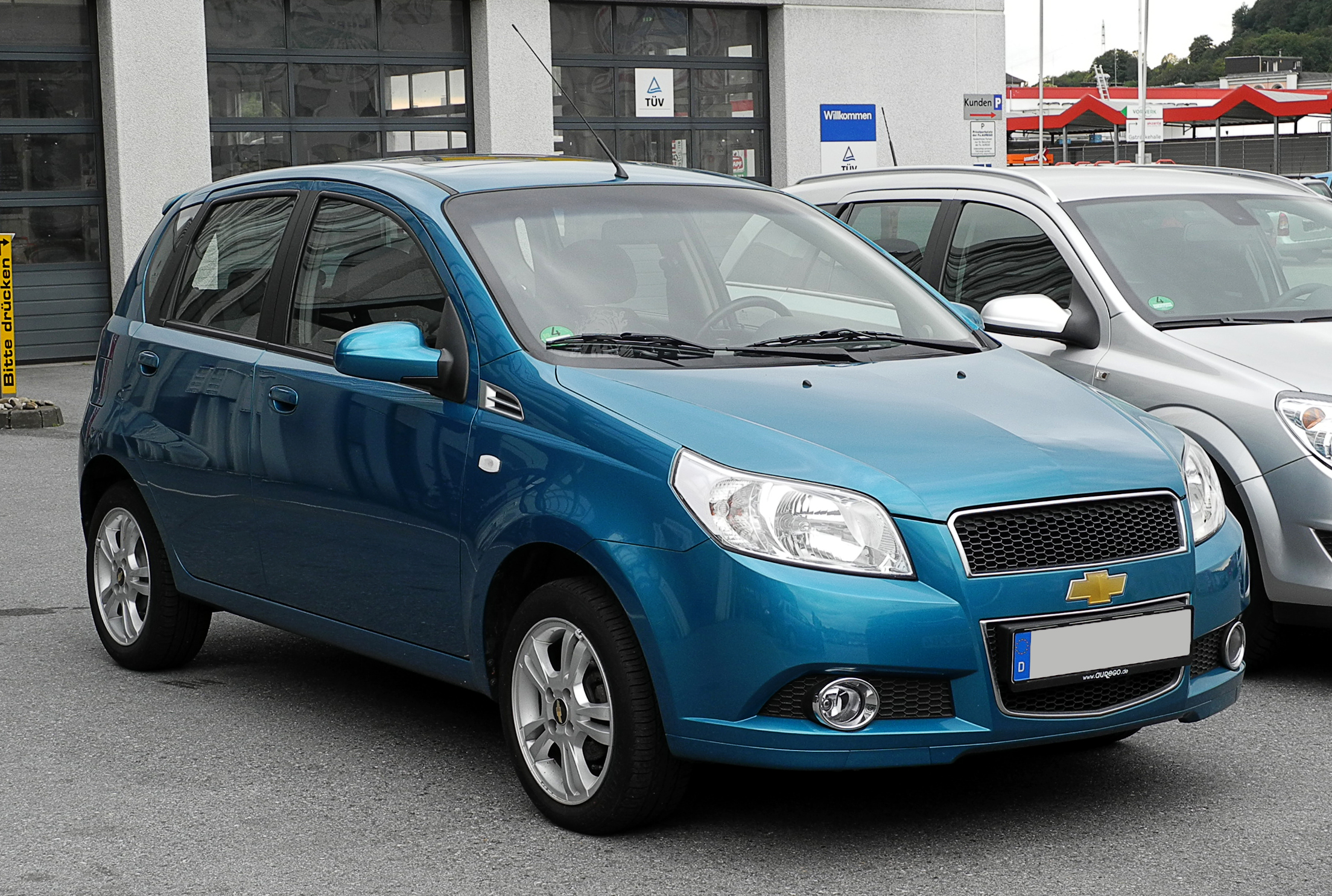 Chevrolet Aveo